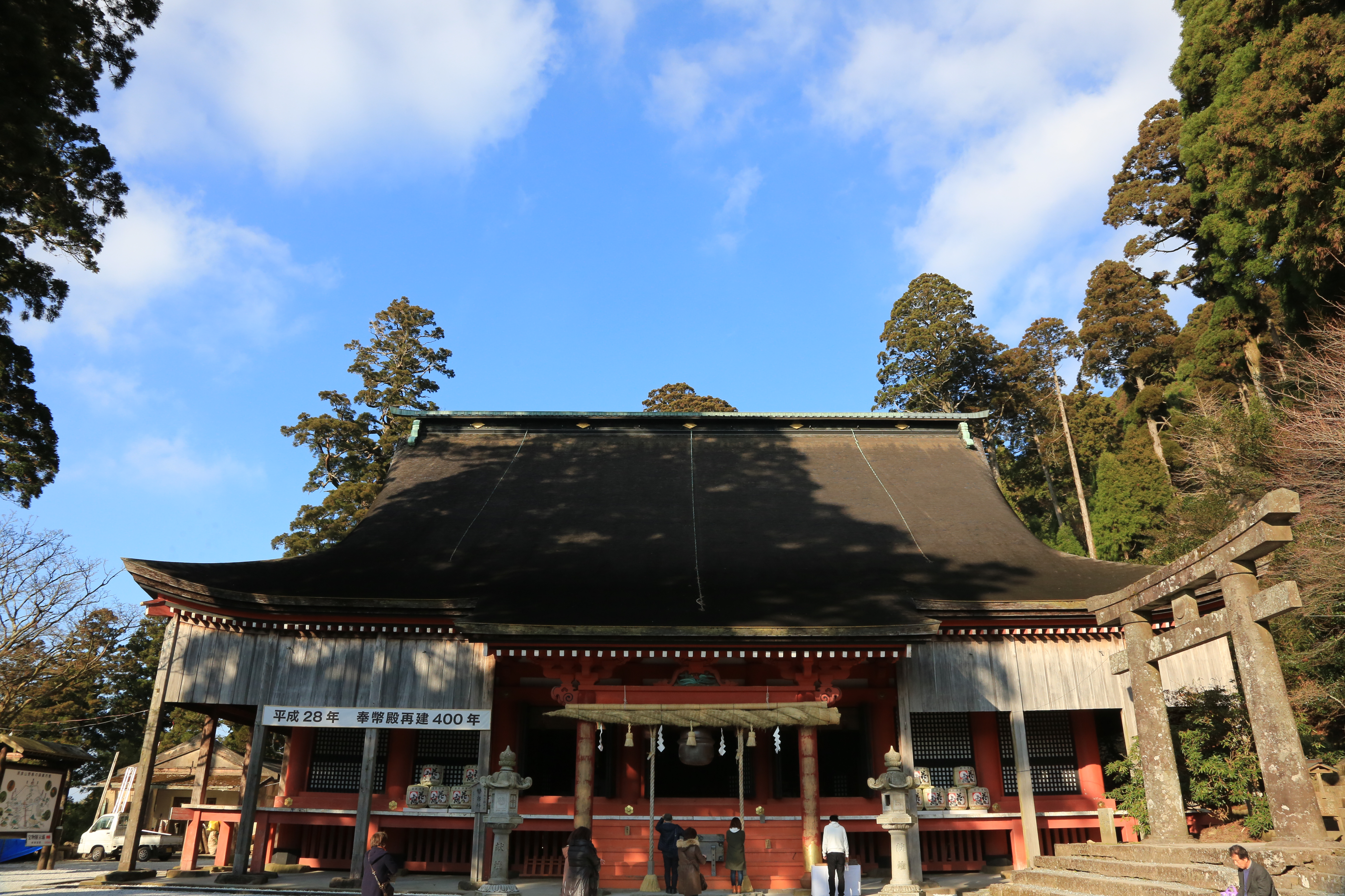 冬の奉幣殿